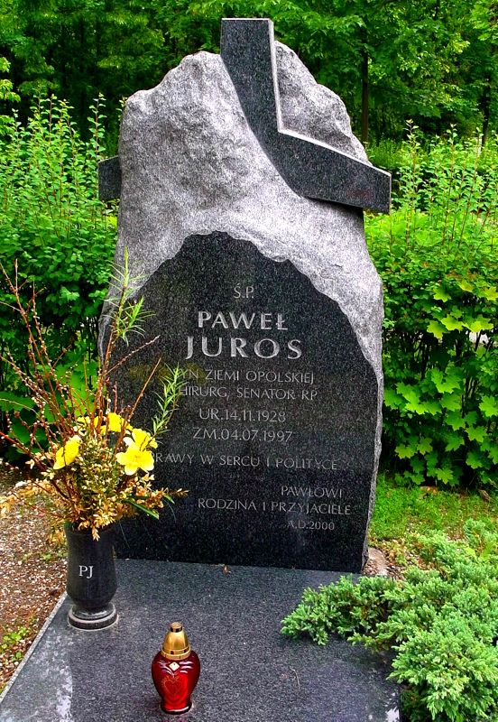 Legnica, cmentarz komunalny, grób Pawła Jurosa